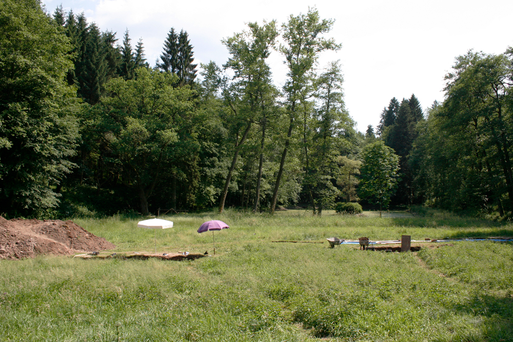 Ehemaliger Standort der Burg Mole. Blick von Norden während der Ausgrabungen 2008.